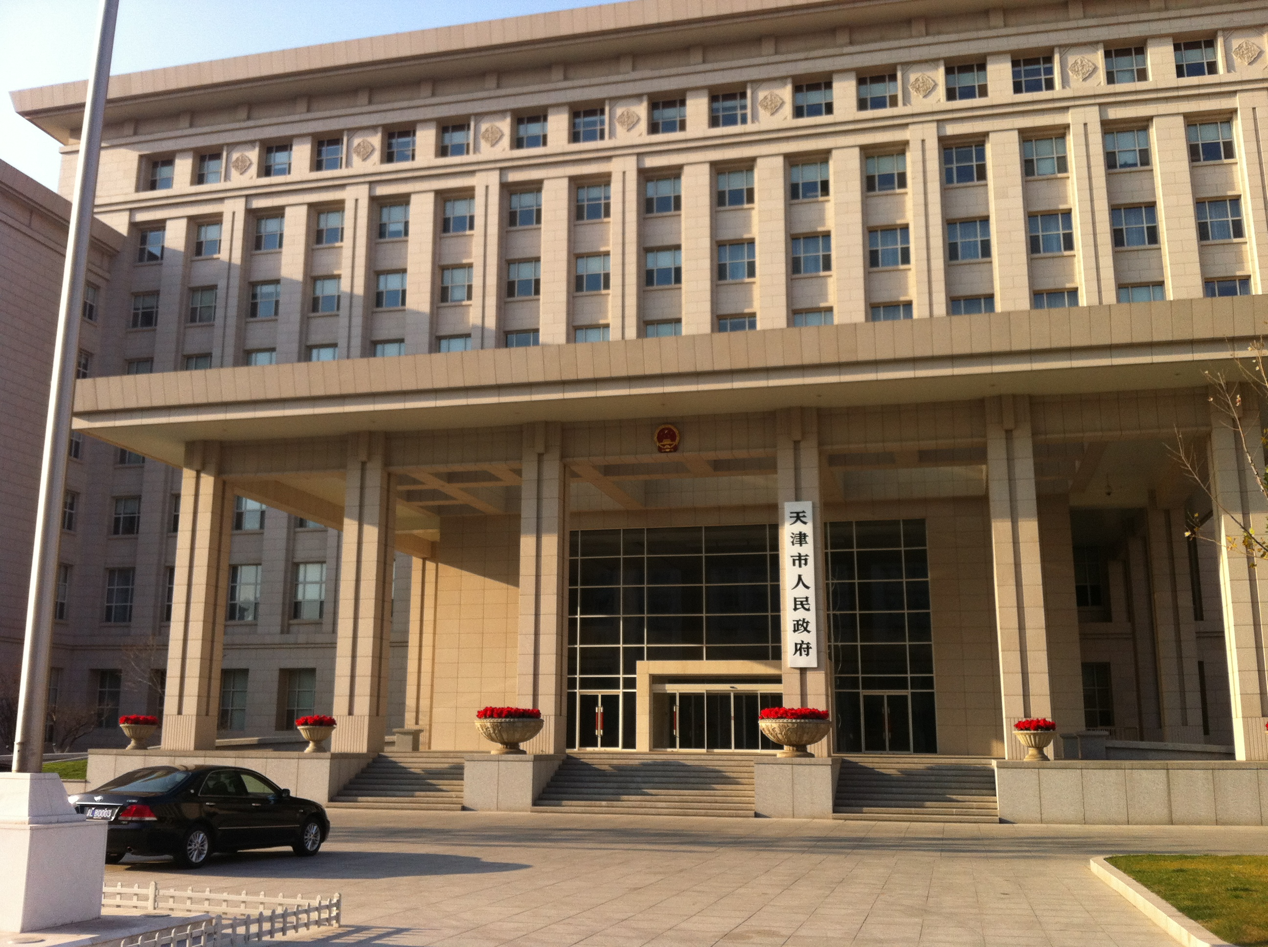 中文（中国大陆）: 天津市人民政府